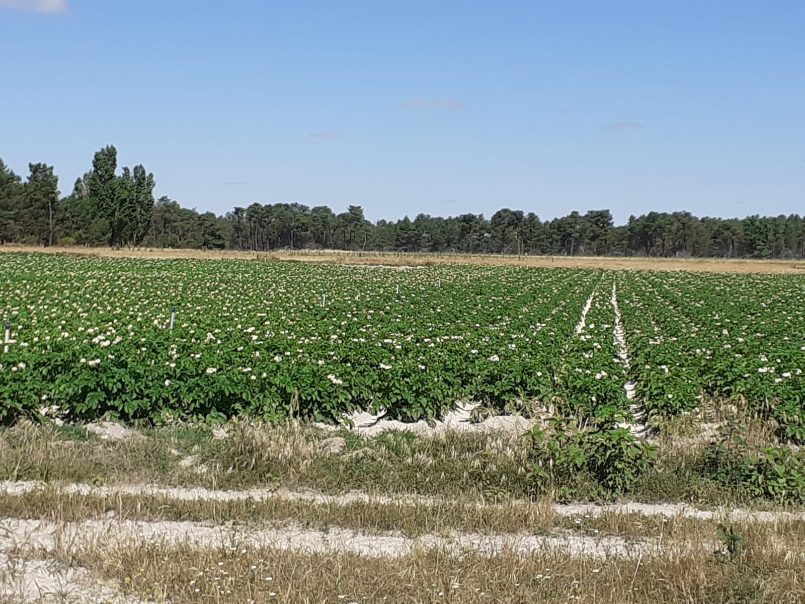 Producto de la huerta del Carracillo